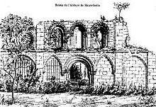 Porche d'abbatiale en ruine